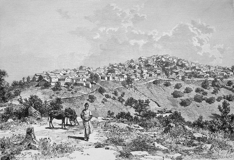 Villa típica cabila, Argelia, 1886.